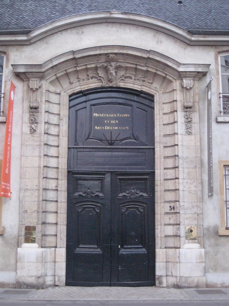 Entrée du Musée des Tissus et des Arts décoratifs de Lyon (ancien hôtel de Villeroy).